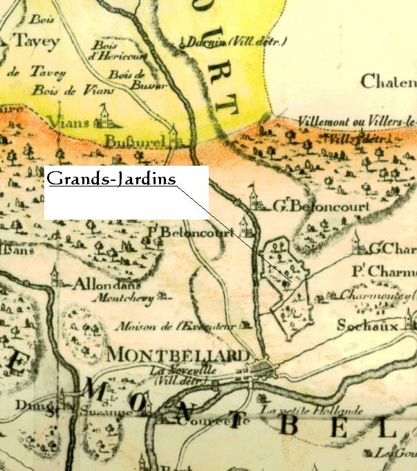 Je suis l'auteur de l'extrait d'une gravure d'avant 1789. Cette gravure est intitulée : "Carte de l'ancienne Principauté de Montbéliard, avant 1789, non compris des Seigneuries d'Alsace et de Franche-Comté". Sans nom d'auteur.